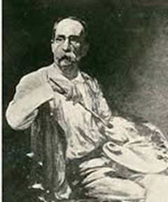 Retrato de Zeferino da Costa.